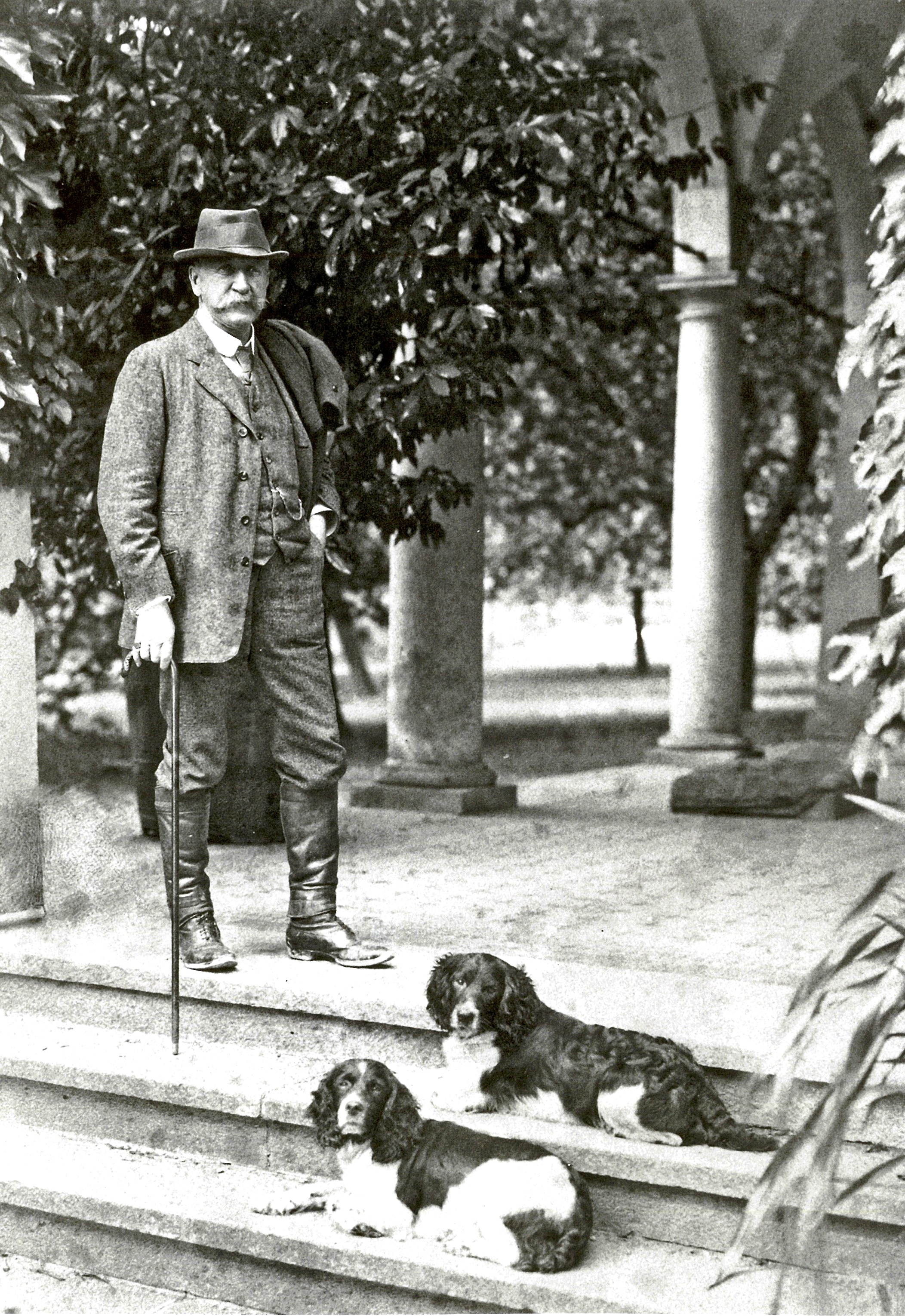 Kartause Ittingen: Besitzer Viktor Fehr in der Loggia, um 1930